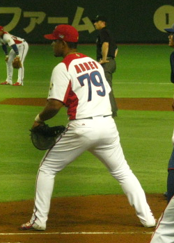 José Dariel Abreu